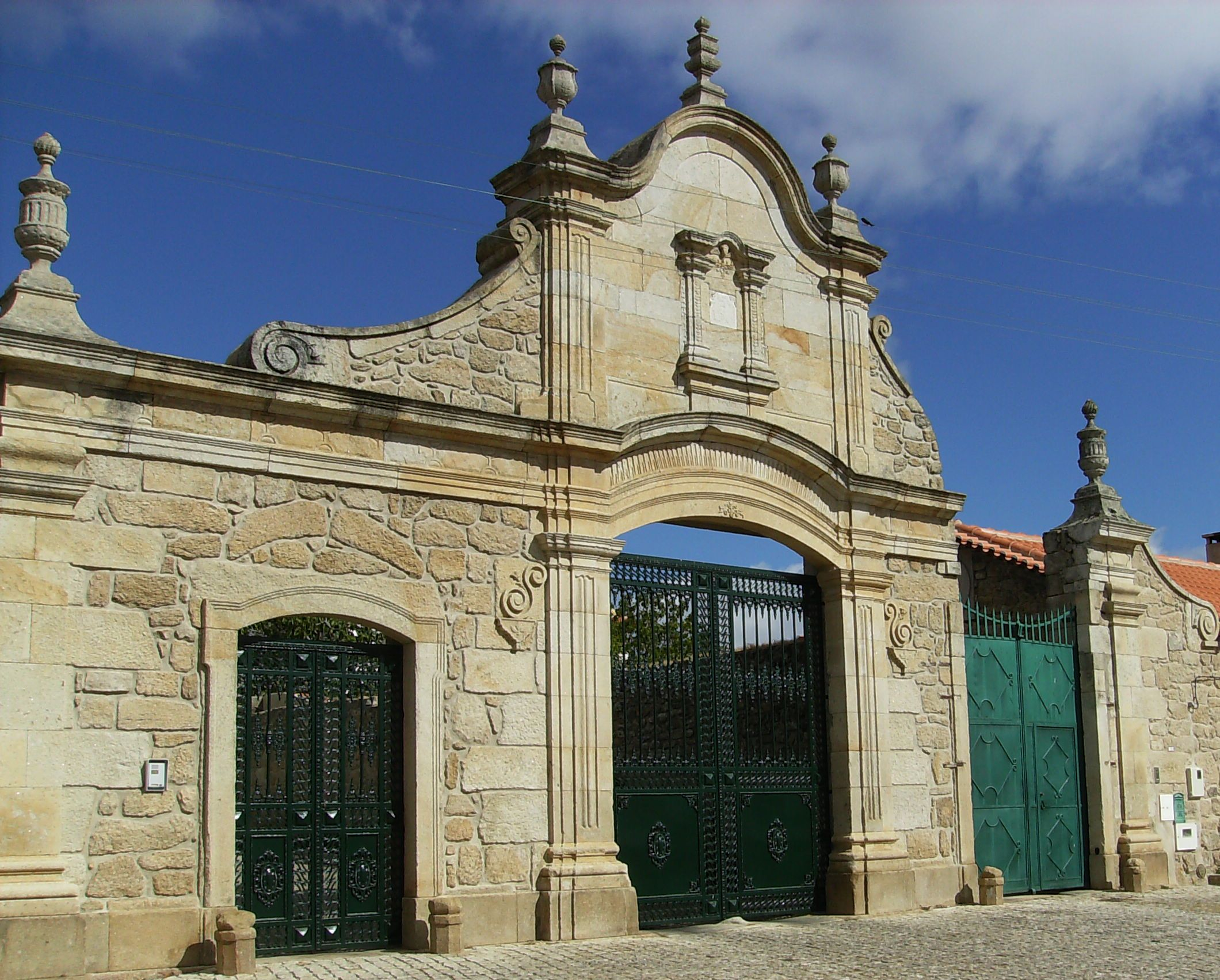 Frontaria Monumental de um Solar, Alcains, Castelo Branco.